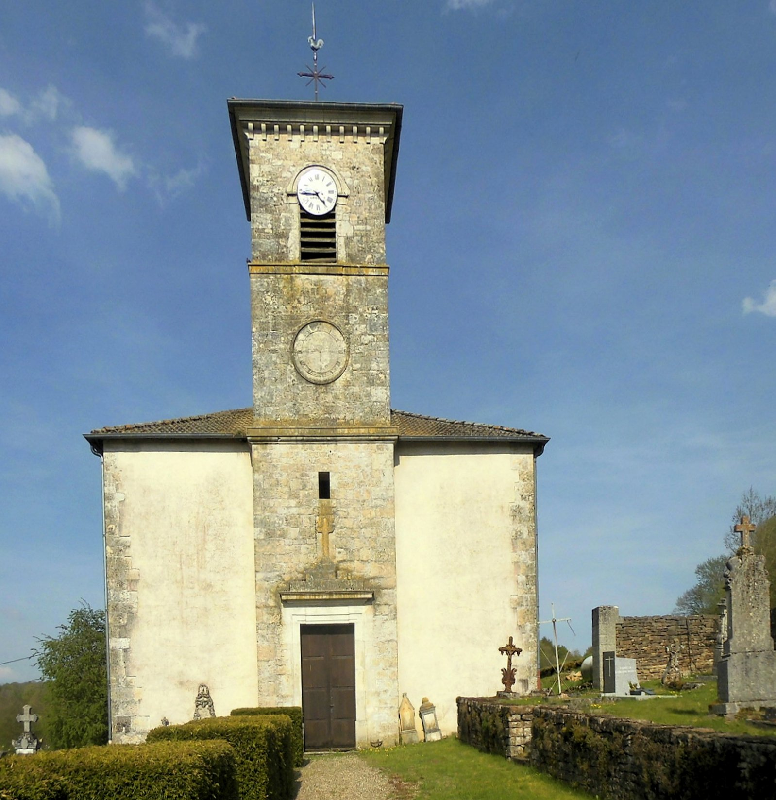 L'église Saint-André de Tramont-Saint-André